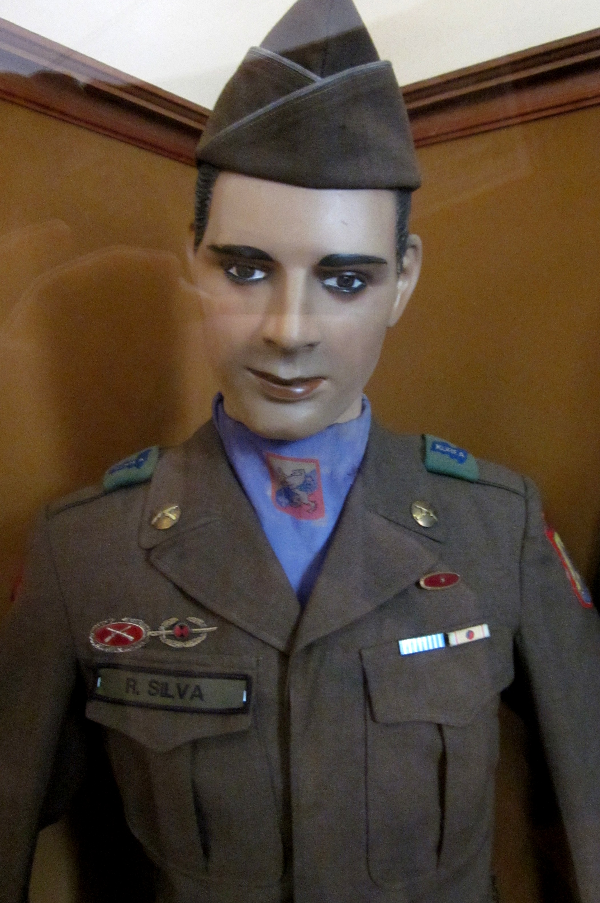 Uniforme del batallon de Colombia utilizado en el guerra de Corea 1951-1954 Museo Militar de Colombia